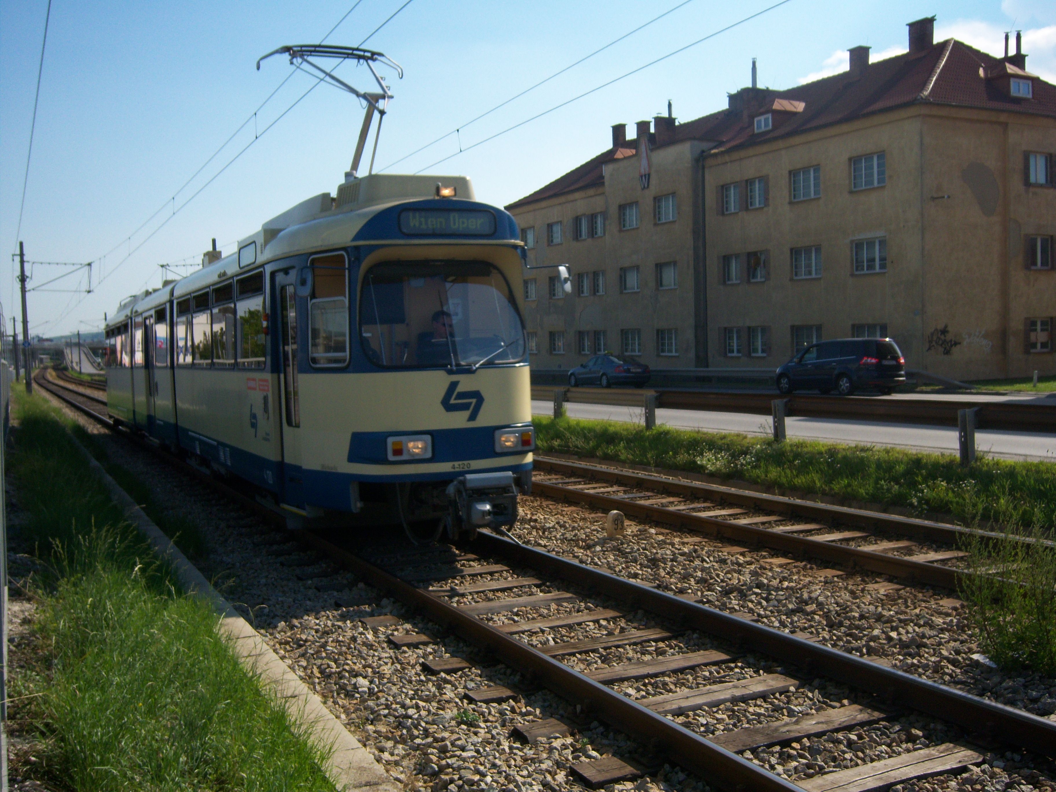 Badner Bahn an der Triester Straße bei Vösendorf